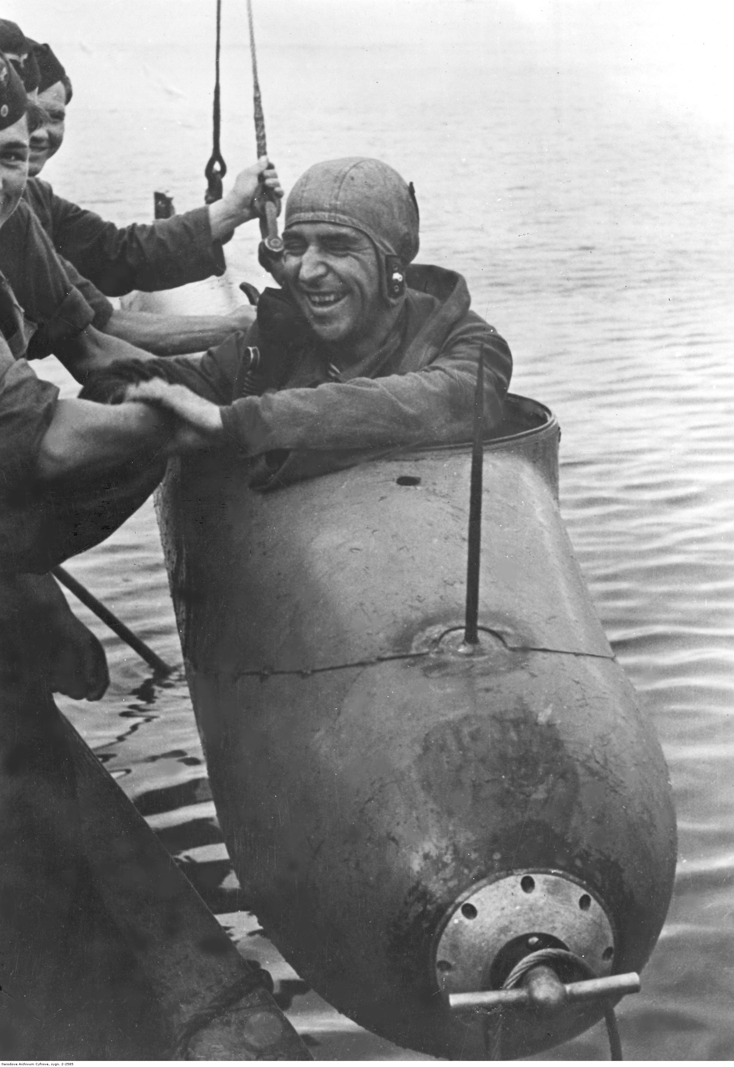 Starszy marynarz Walter Gerhold - pilot jednoosobowej łodzi torpedowej tzw. "żywej torpedy" po przeprowadzonej akcji.